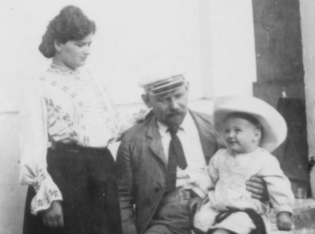 Martin Bohdan Lány (1876 - 1941), Český cestovatel, obchodník a misionář s manželkou Emou a synem na misijní stanici.